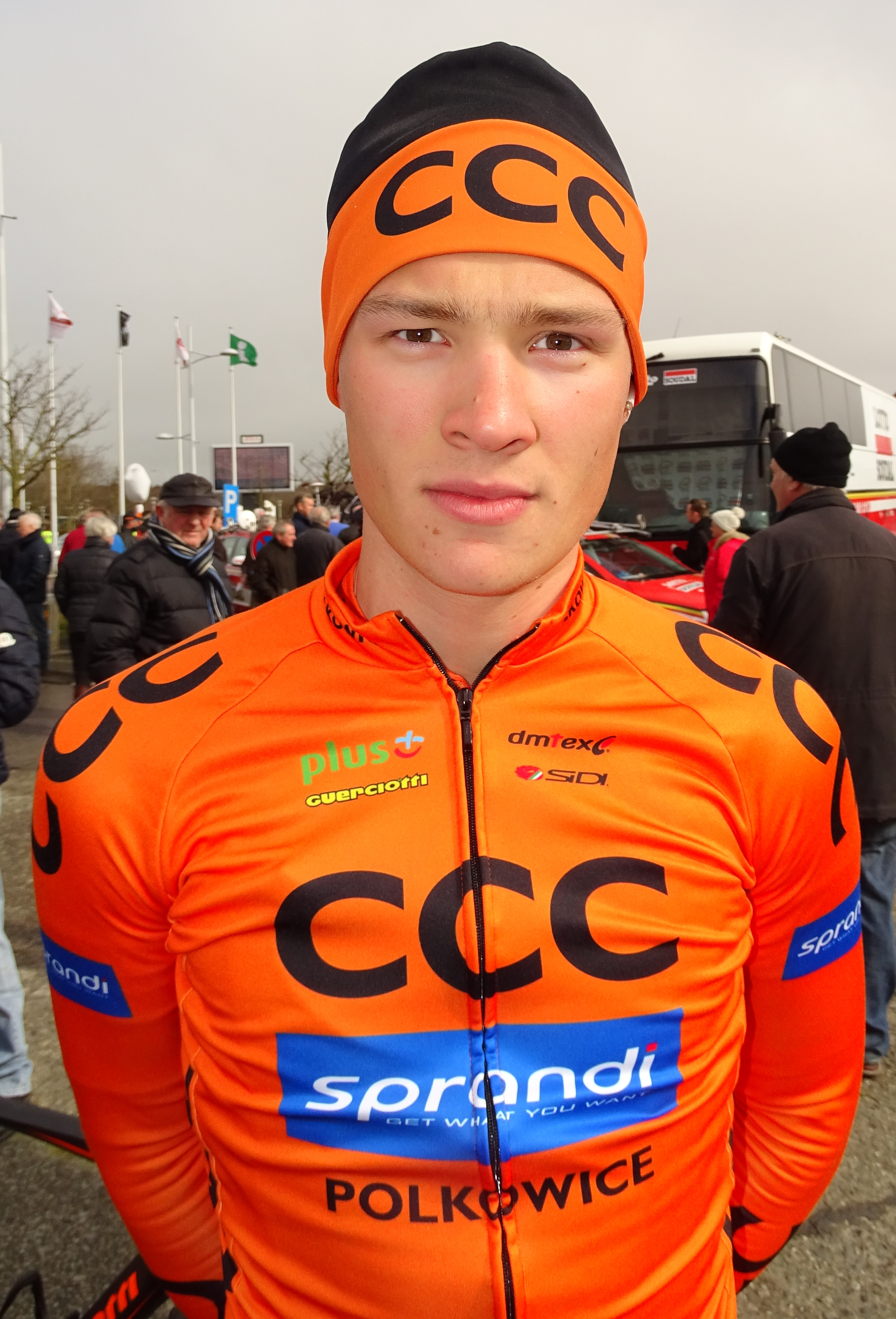 Reportage réalisé le vendredi 18 mars à l'occasion du départ de la Handzame Classic 2016 à Bredene, Belgique.